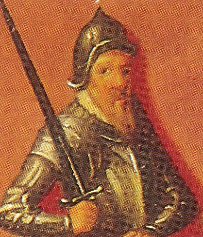 Friedrich I.